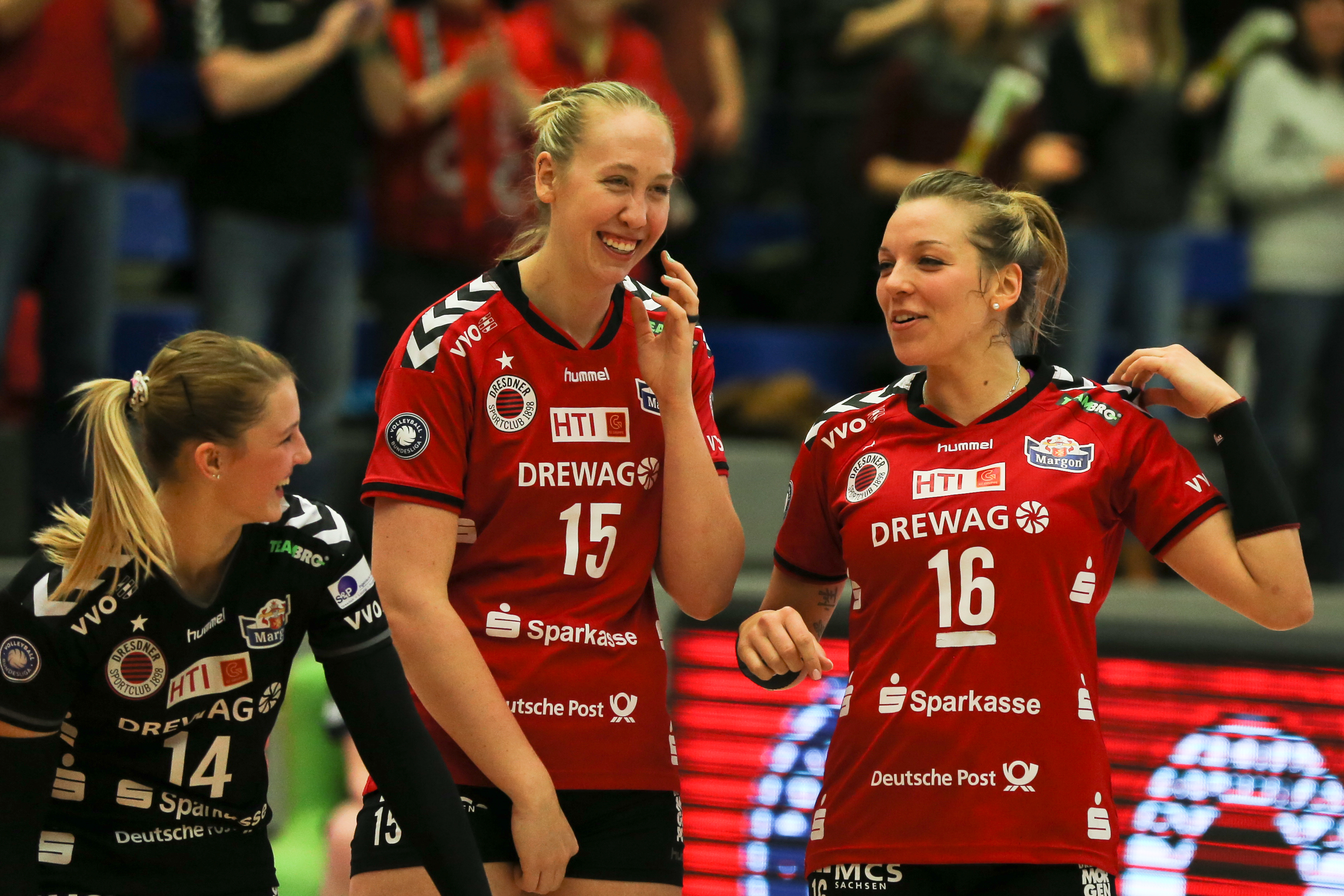 Volleyballspiel in der 1. Bundesliga des Dresdner SC gegen Aurubis Hamburg in der Margon Arena in Dresden.